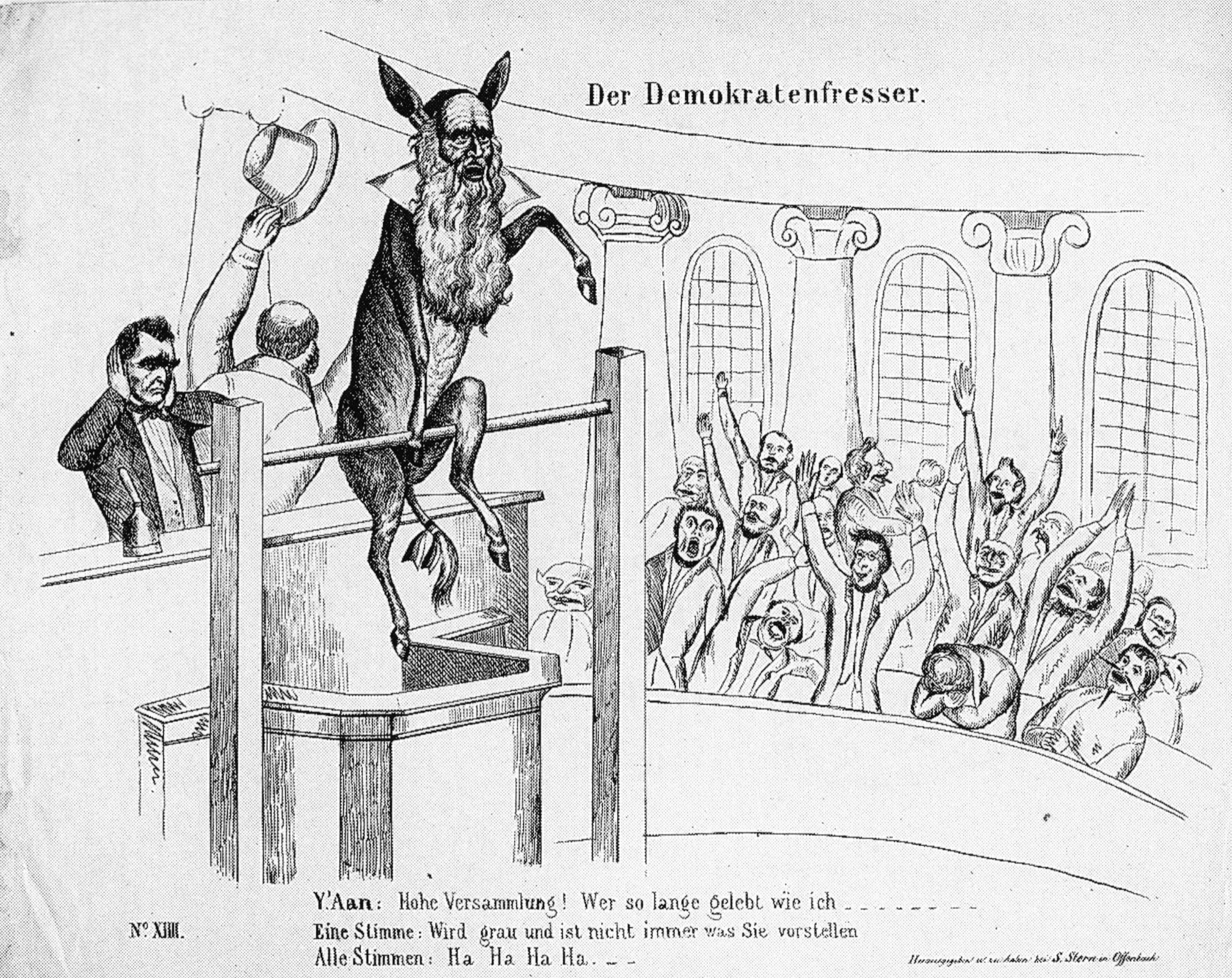 Lithographie, 1848. “Der Demokratenfresser”. Friedrich Ludwig Jahn als Esel.